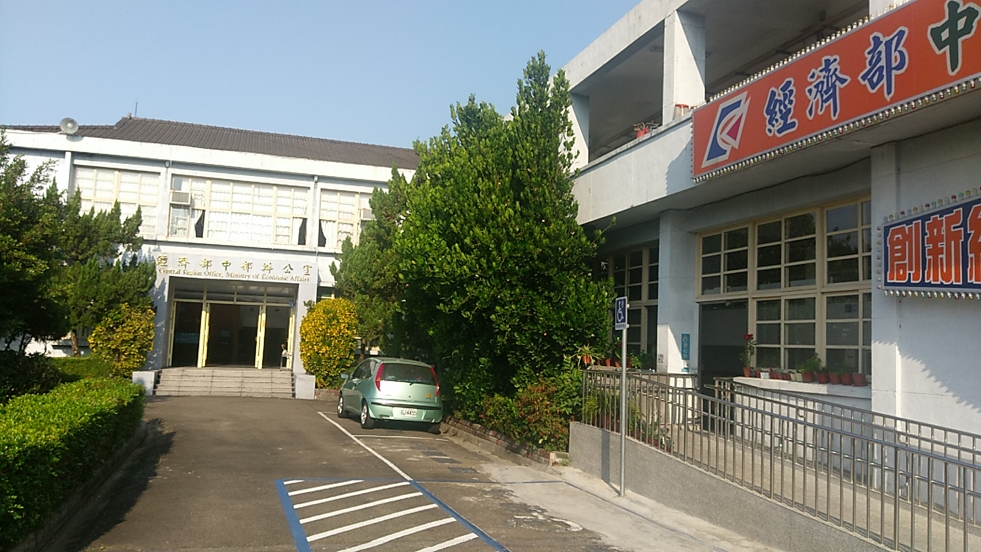 經濟部中部辦公室，南投中興新村。